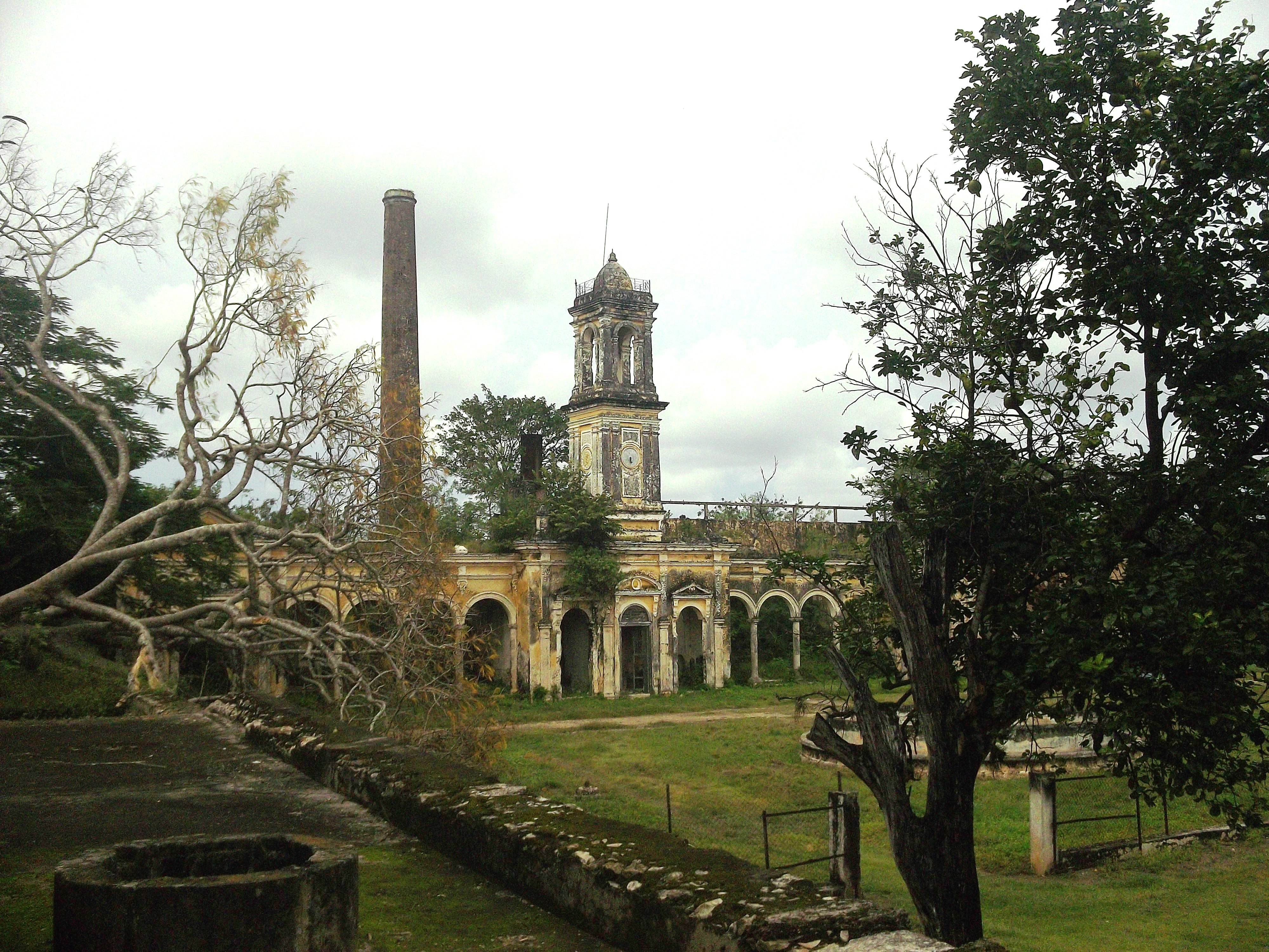 Vista de la hacienda de Uayalceh, Yucatán.